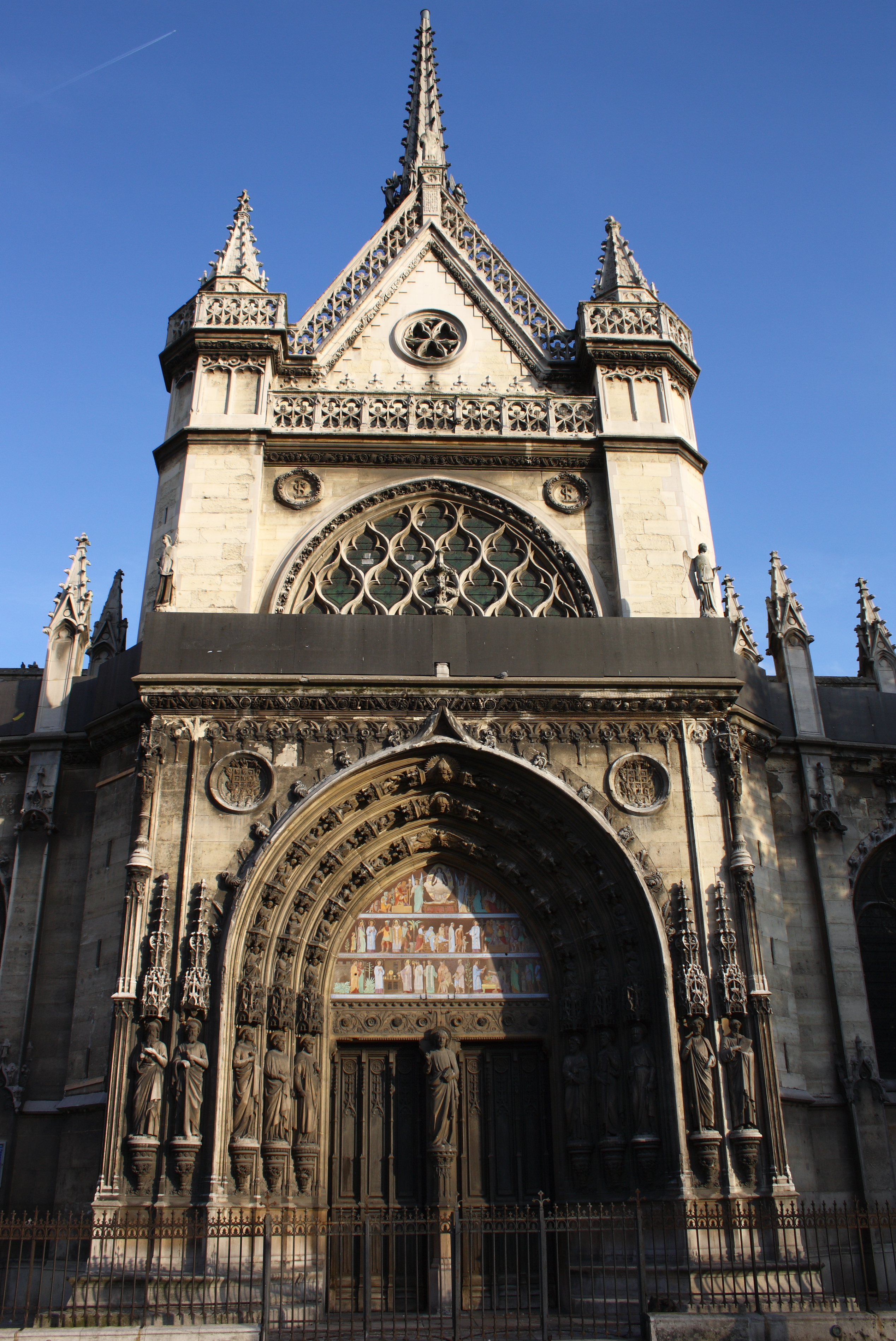 Katholische Pfarrkirche Saint-Laurent im 10. Arrondissement von Paris, Portalfassade